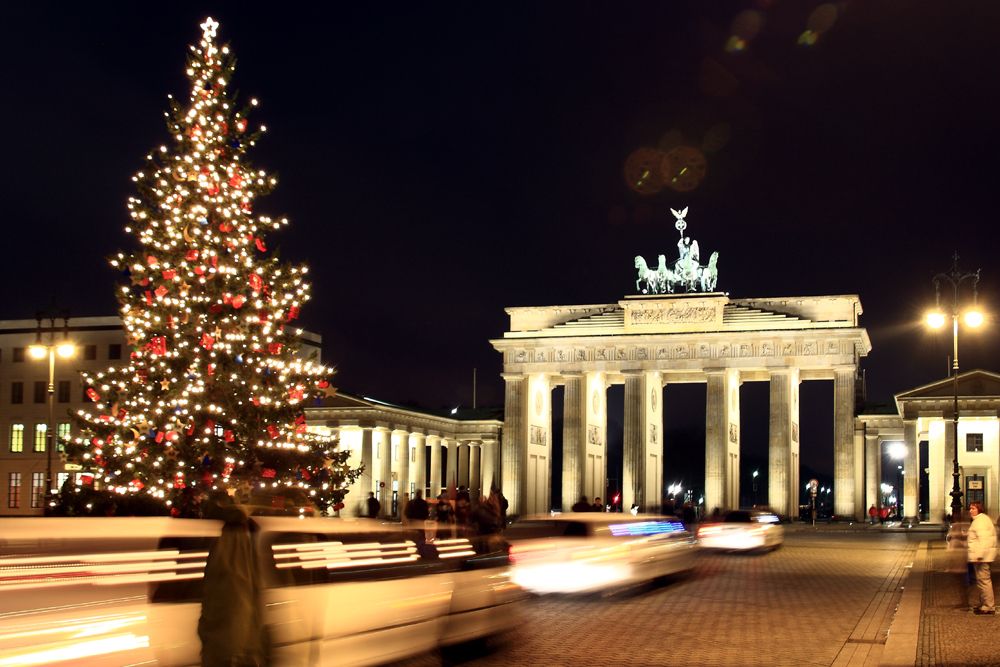 Mitte, Berlin, Germany